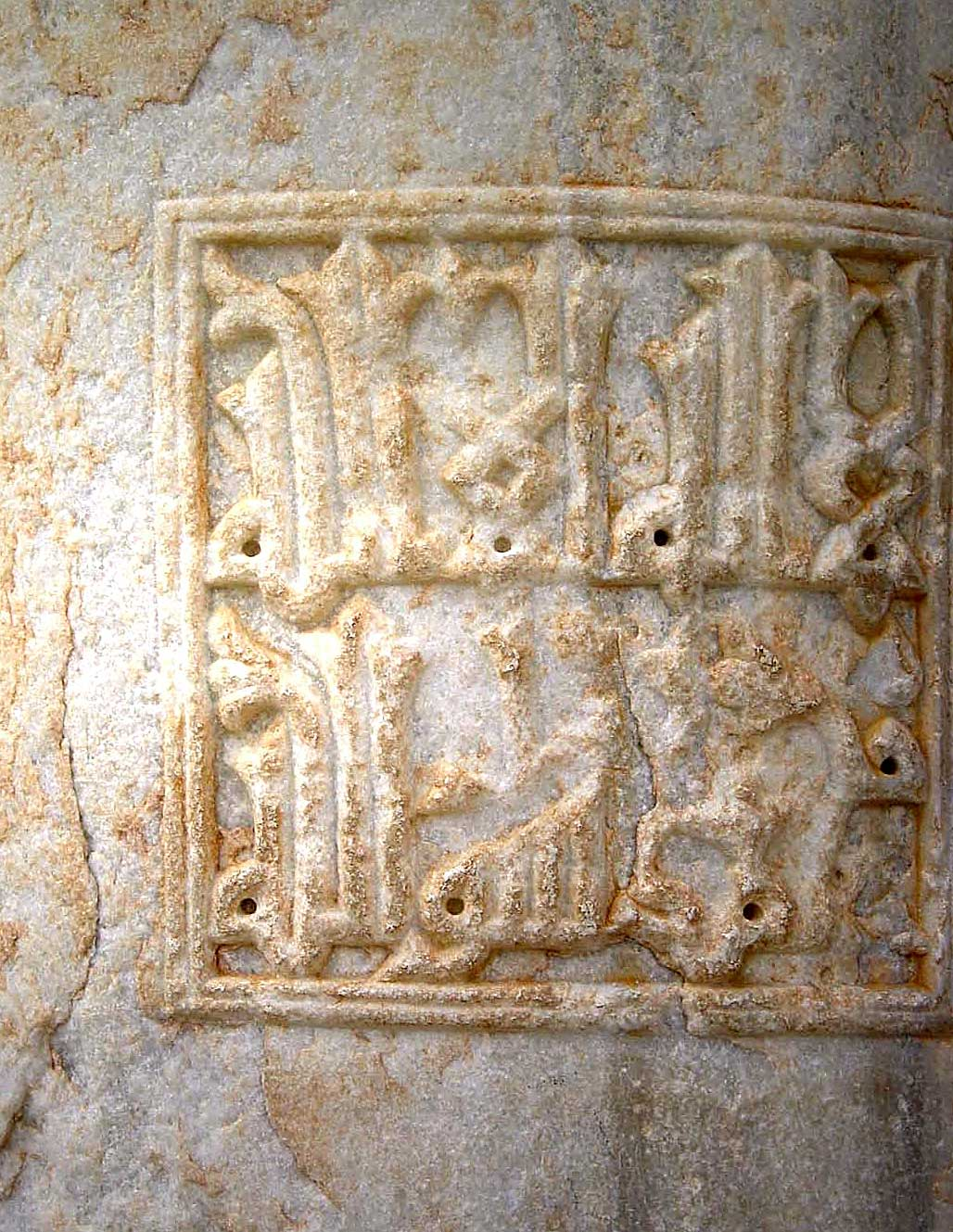 Bildautor: Benutzer Orientalist aus der deutschen Wikipedia